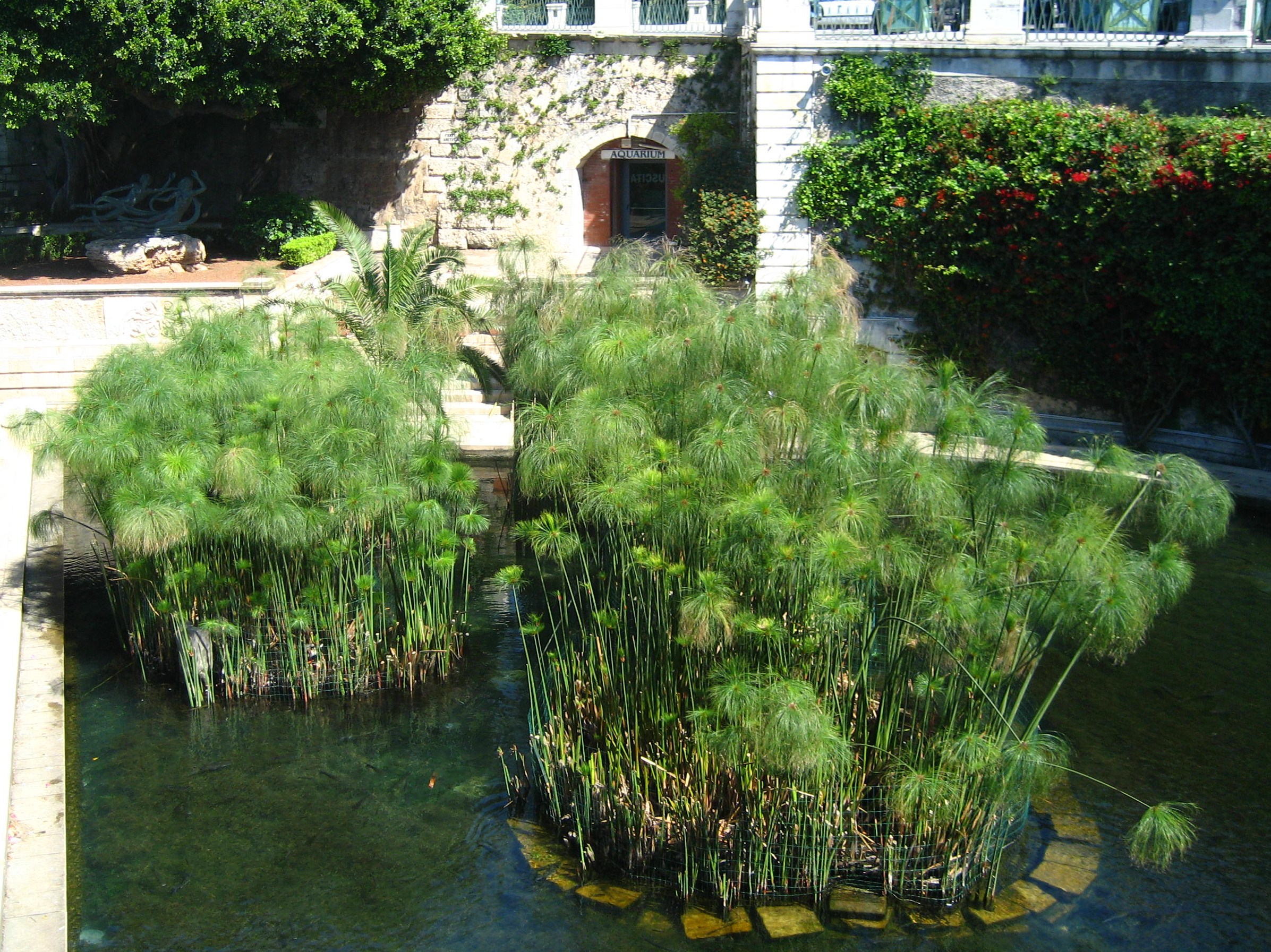 La Fontana Aretusa